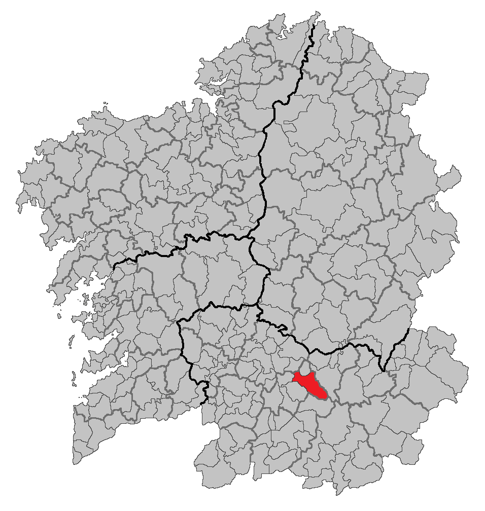 Mapa coa localización do concello de Maceda.